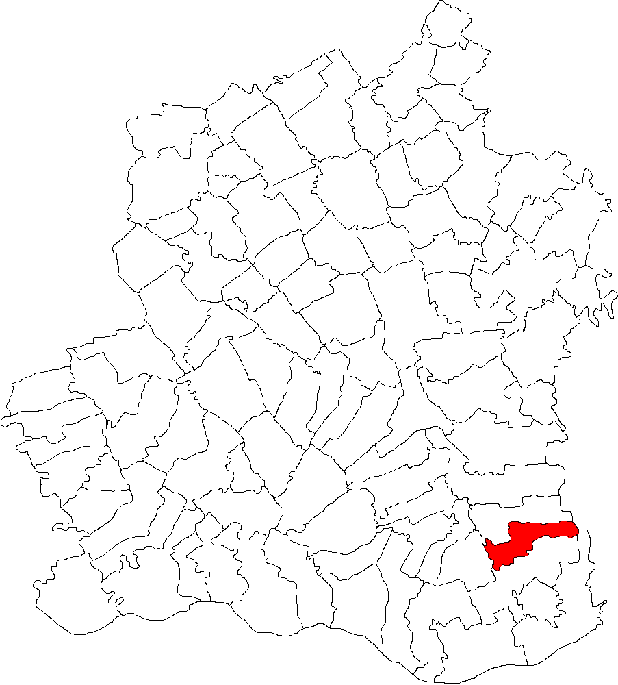 Categorie:Hărţi ale judeţului Teleorman